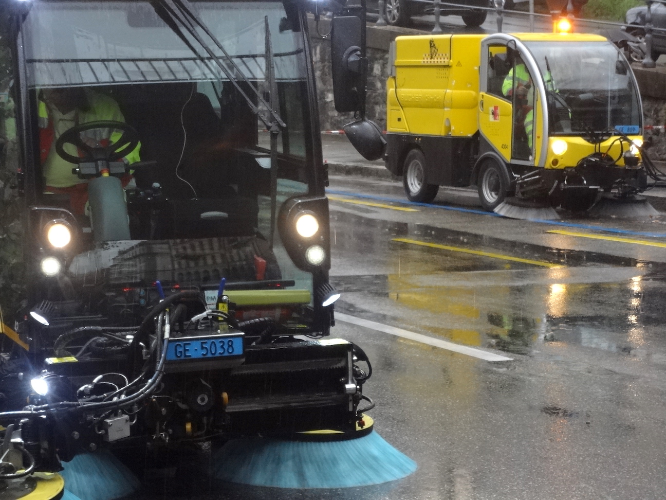 La Saga des Géants à Genève. La Grand-Mère va du Parc La Grange à la Plaine de Plainpalais. Boulevard Helvétique : derrière le cortège passent les balayeuses de la Ville de Genève.